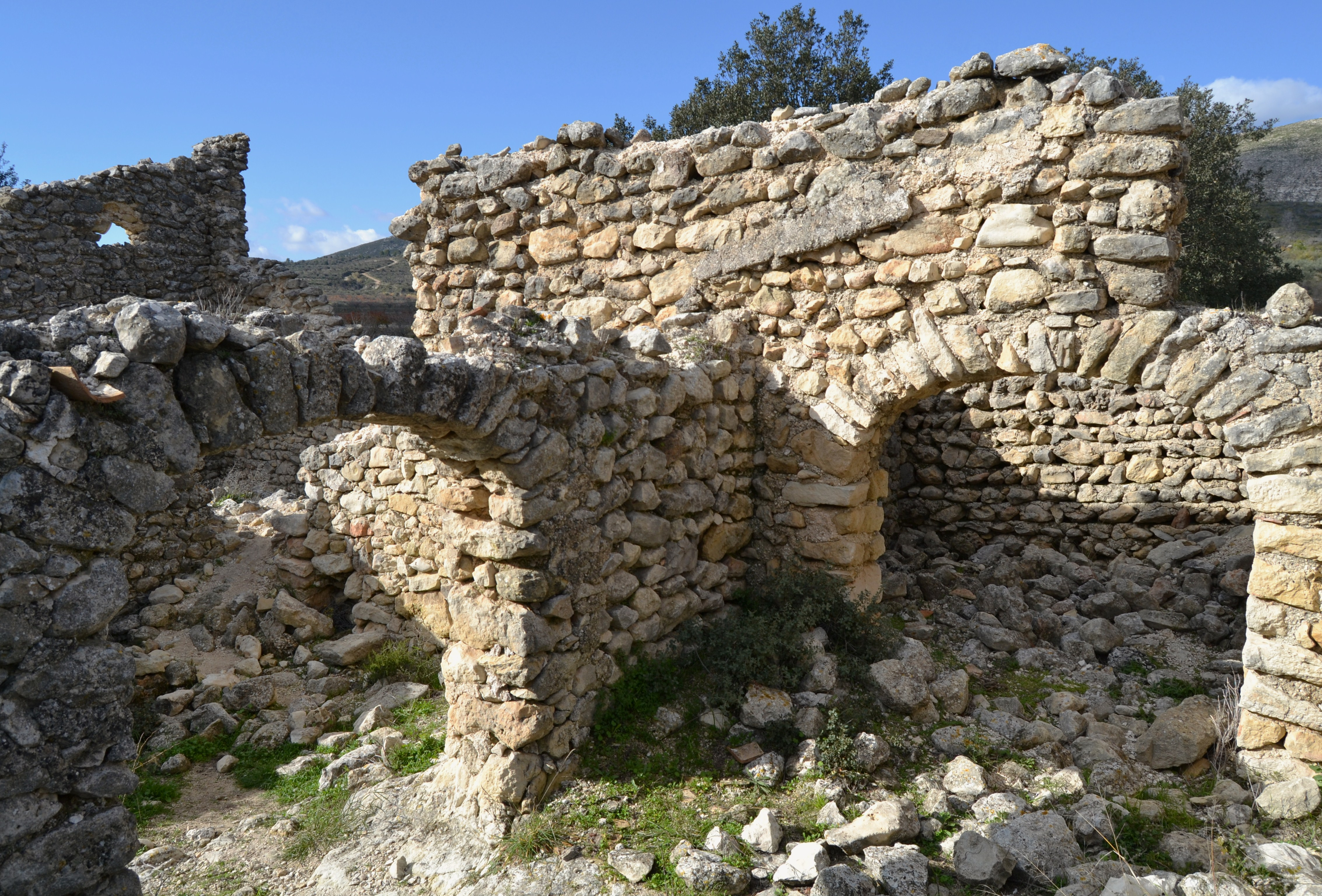 Despoblat de l'Atzvieta, accés als habitatges.